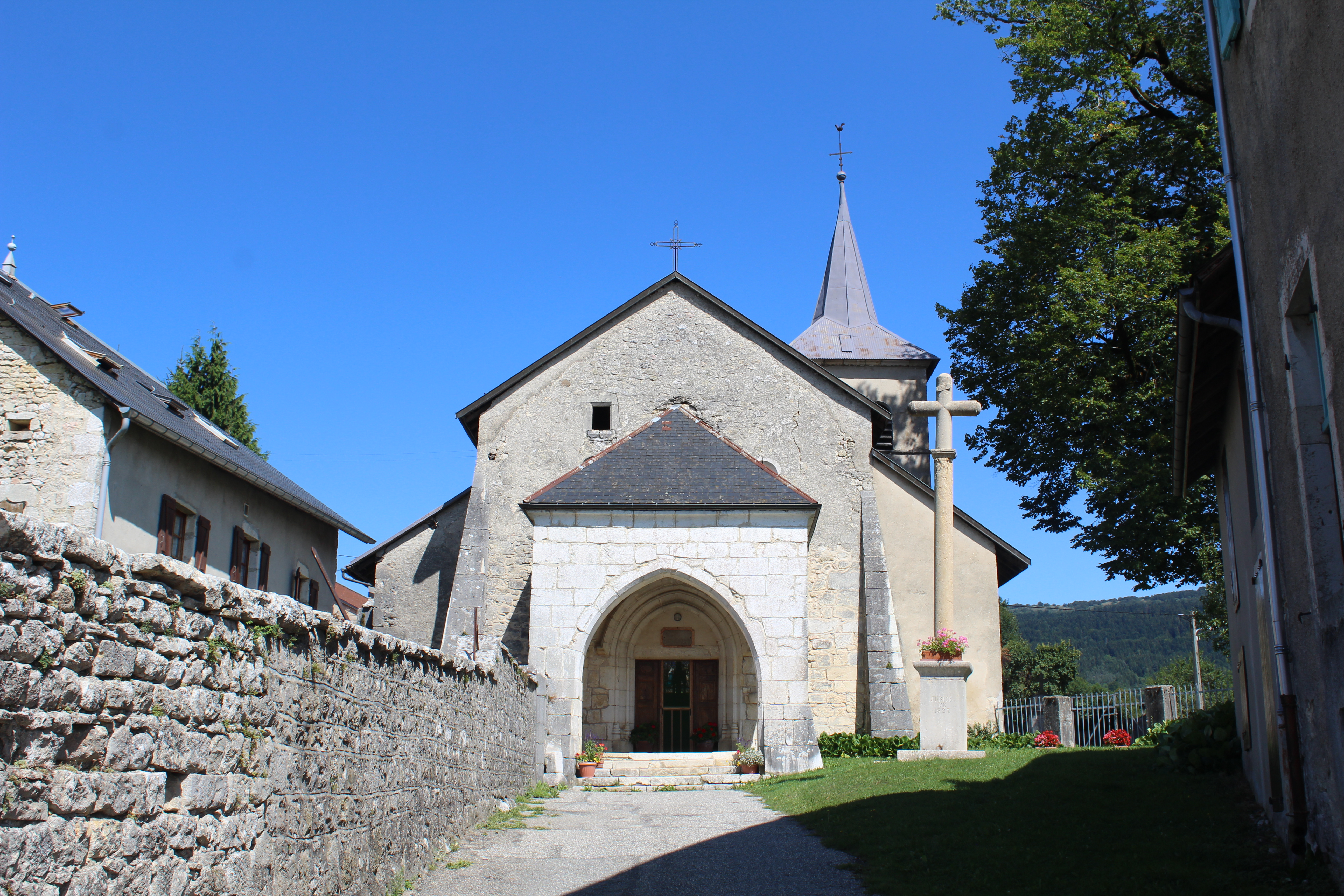 Église Saint-Martin de Songieu, Haut-Valromey.